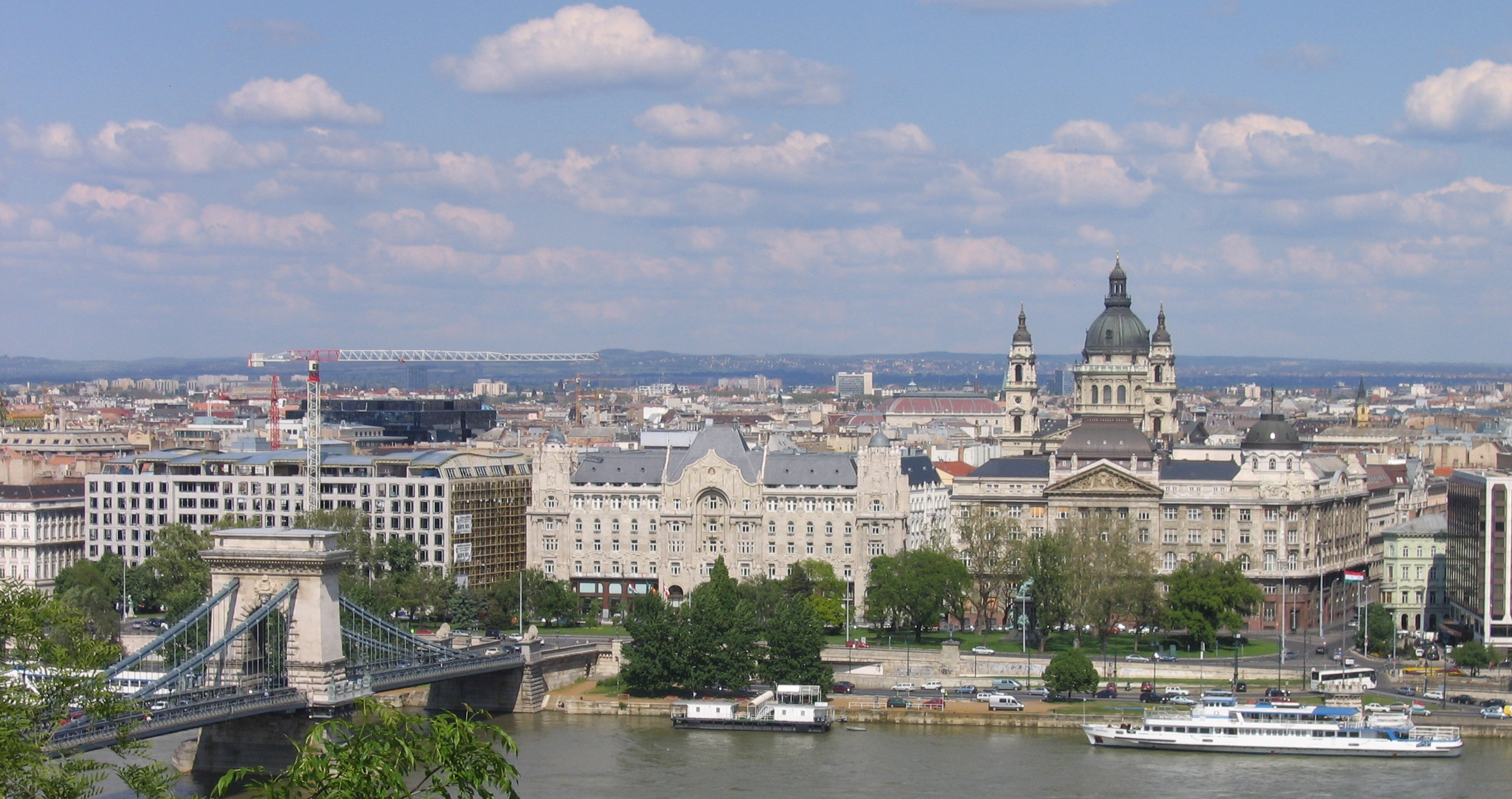 Budapest, Hungary